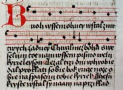 záznam písně